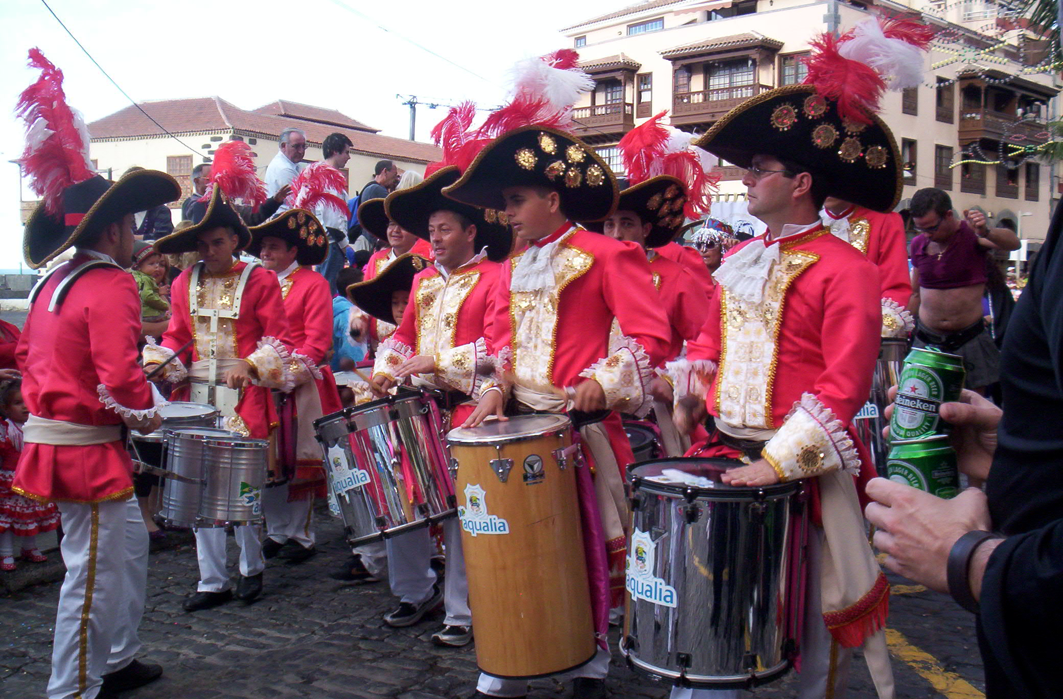 Coso Carnaval 2008, Puerto de la Cruz, Tenerife, Canarias